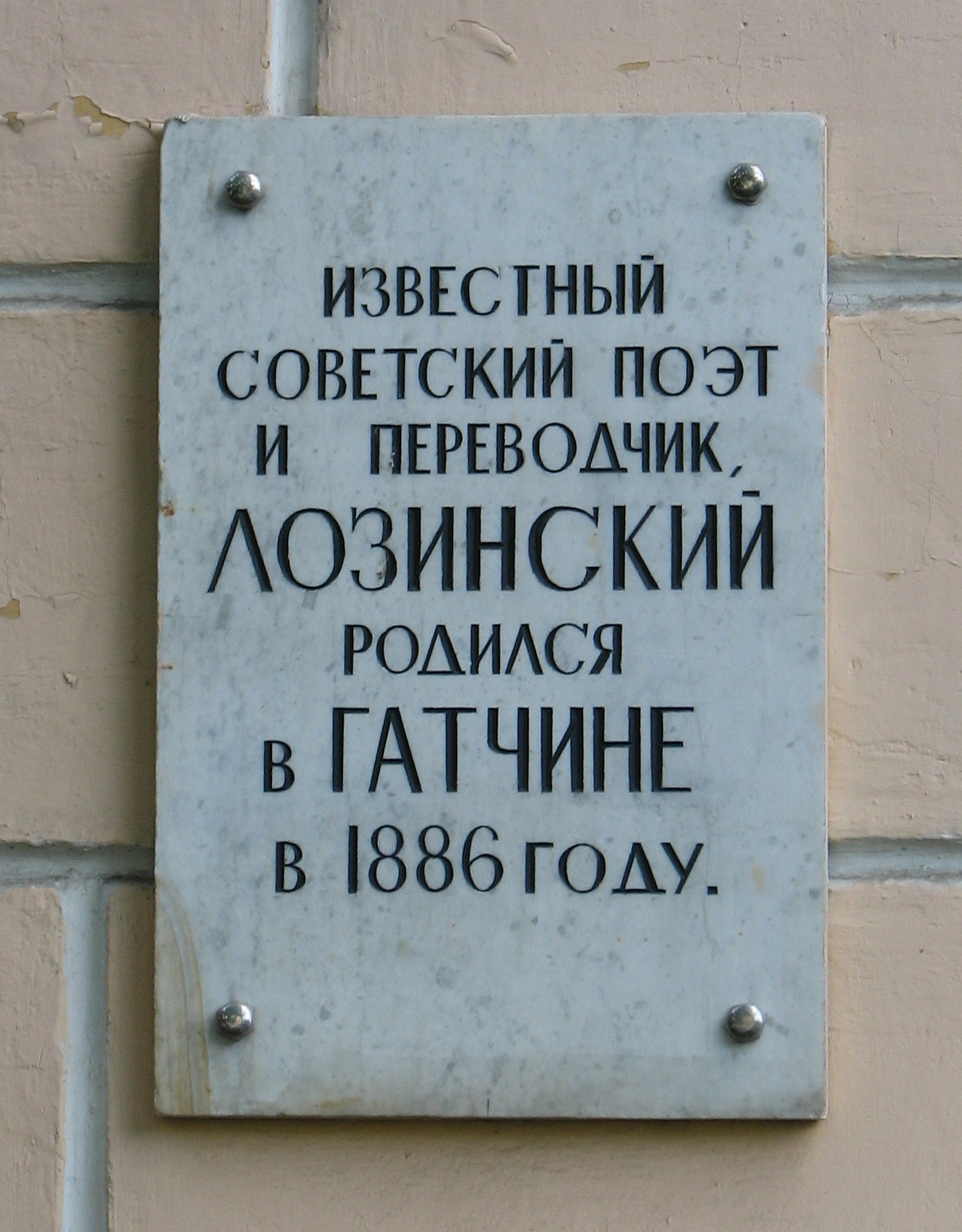 Мемориальная доска, посвящённая советскому поэту и переводчику Лозинскому. Проспект 25 Октября, Гатчина